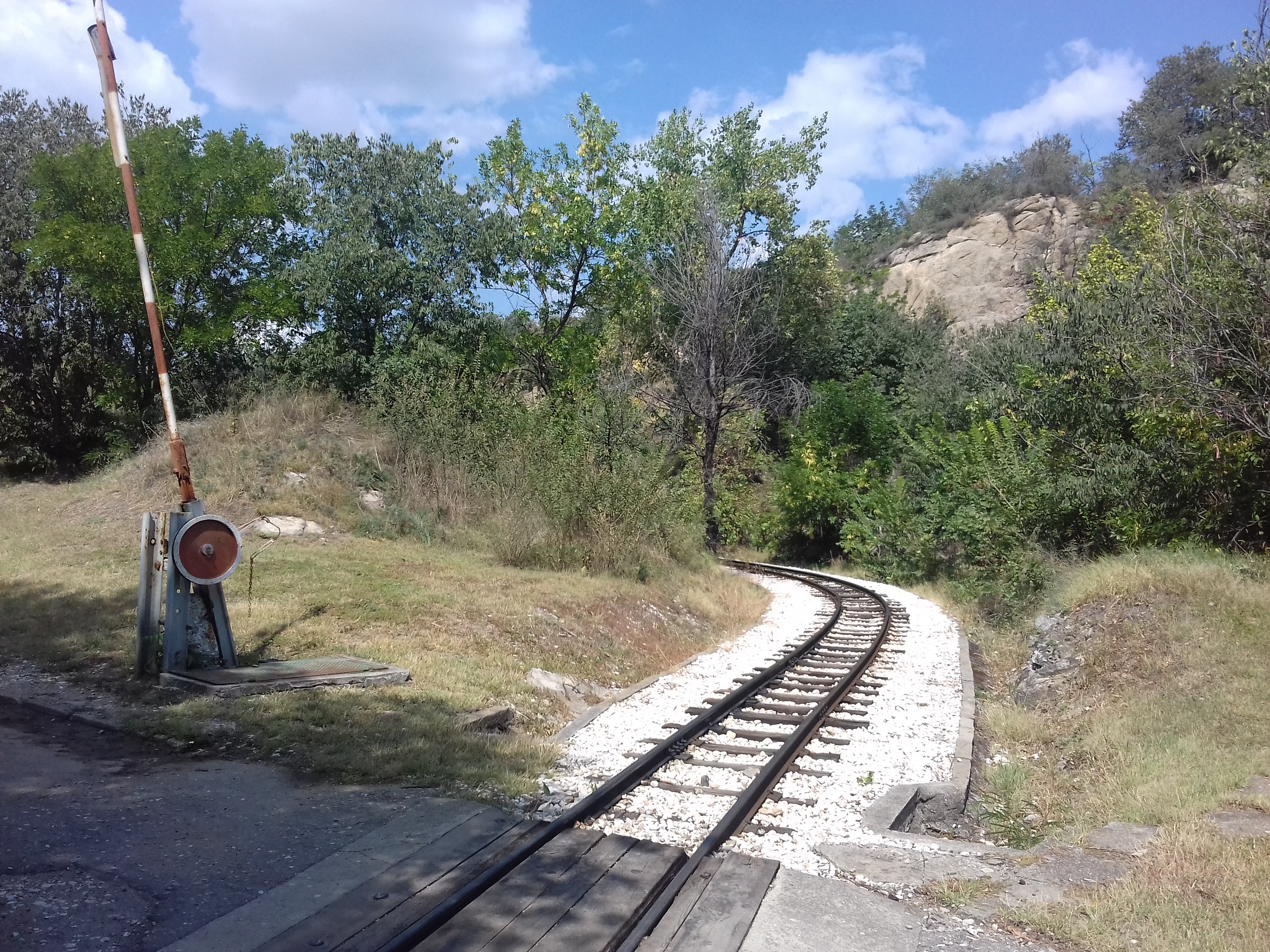 Детската железница в Пловдив.